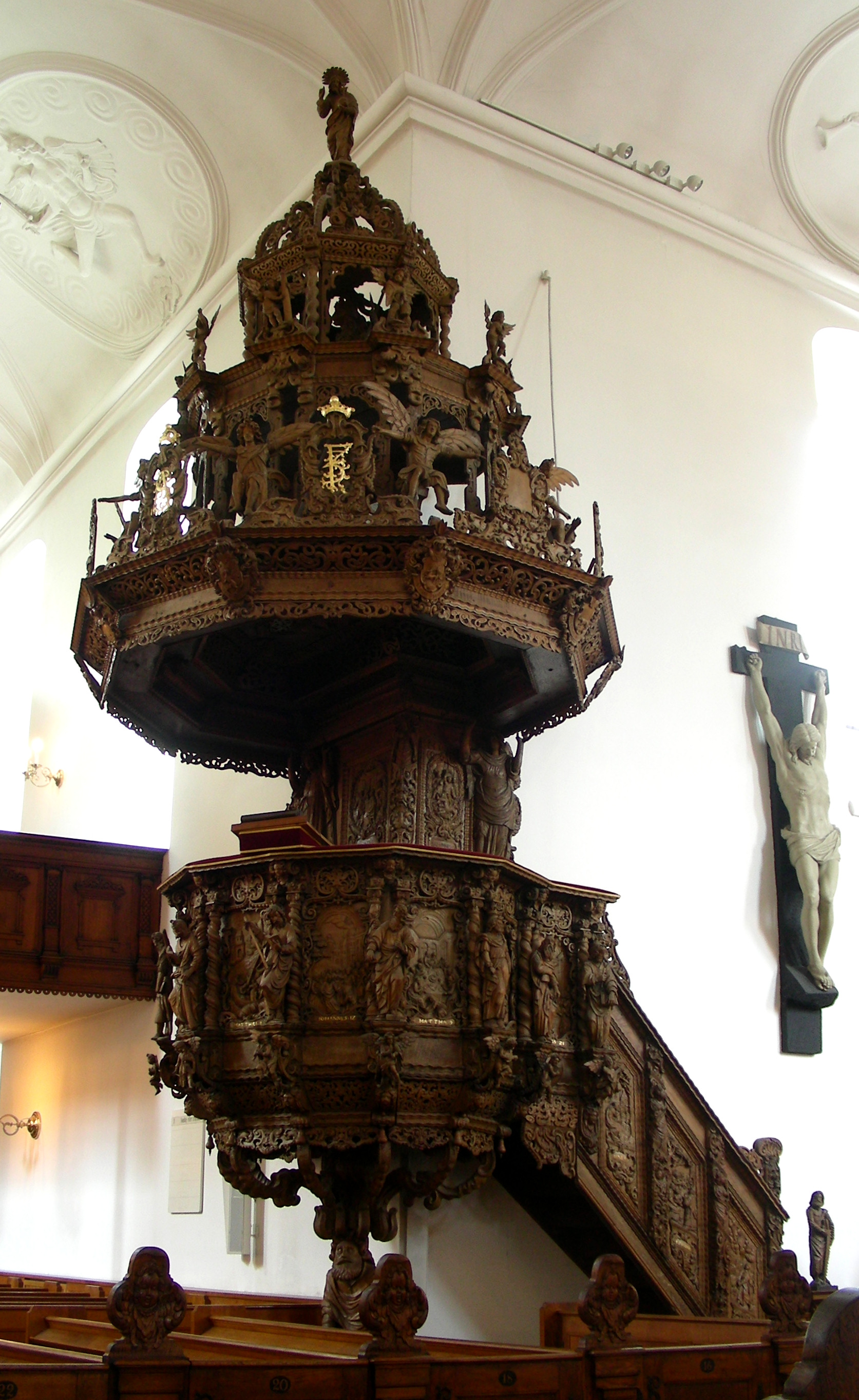 Holmens Kirke, Copenhagen, Denmark. Pulpit.